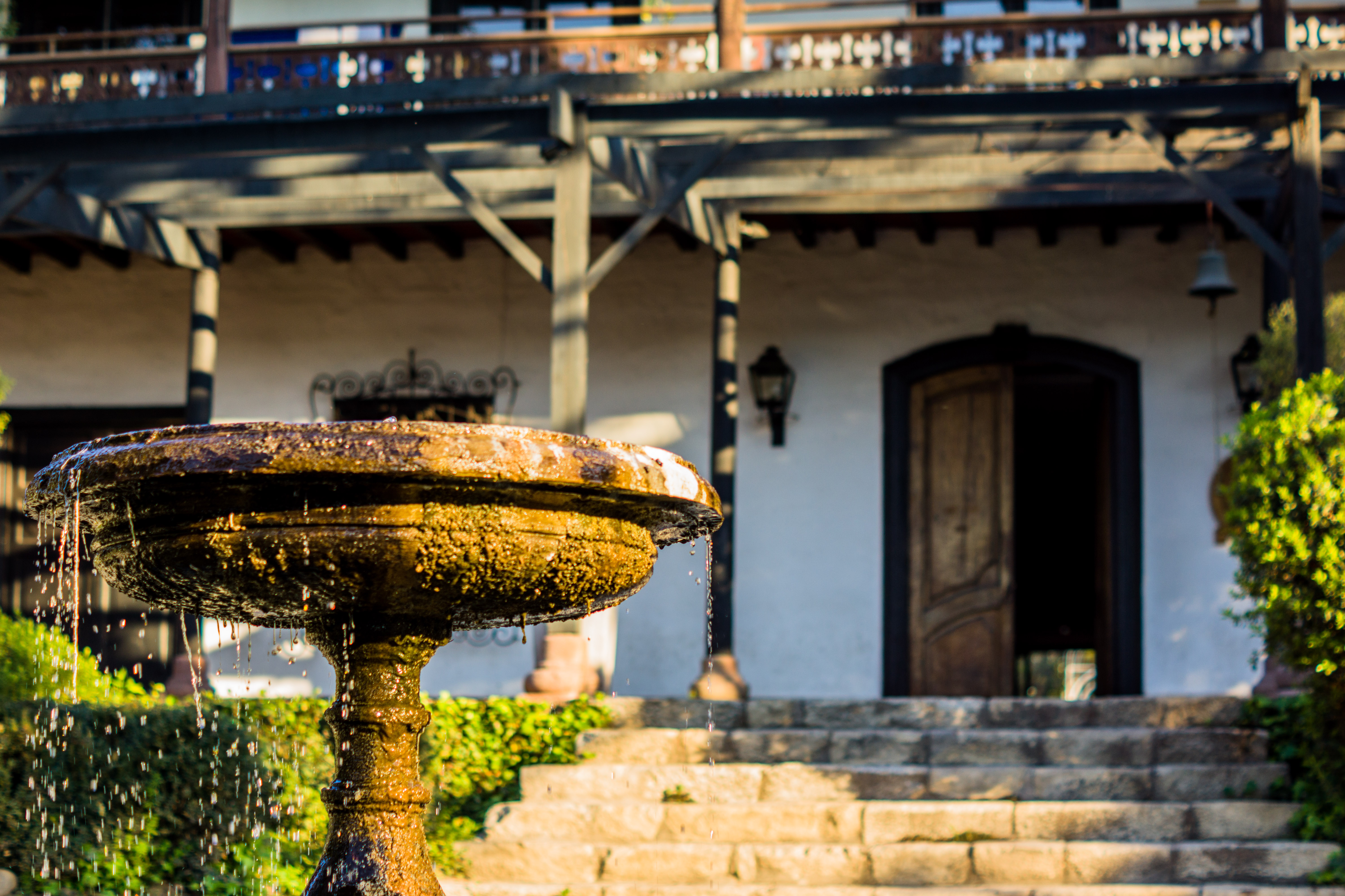 Casona de Las Condes This is a photo of a national monument in Chile: 847